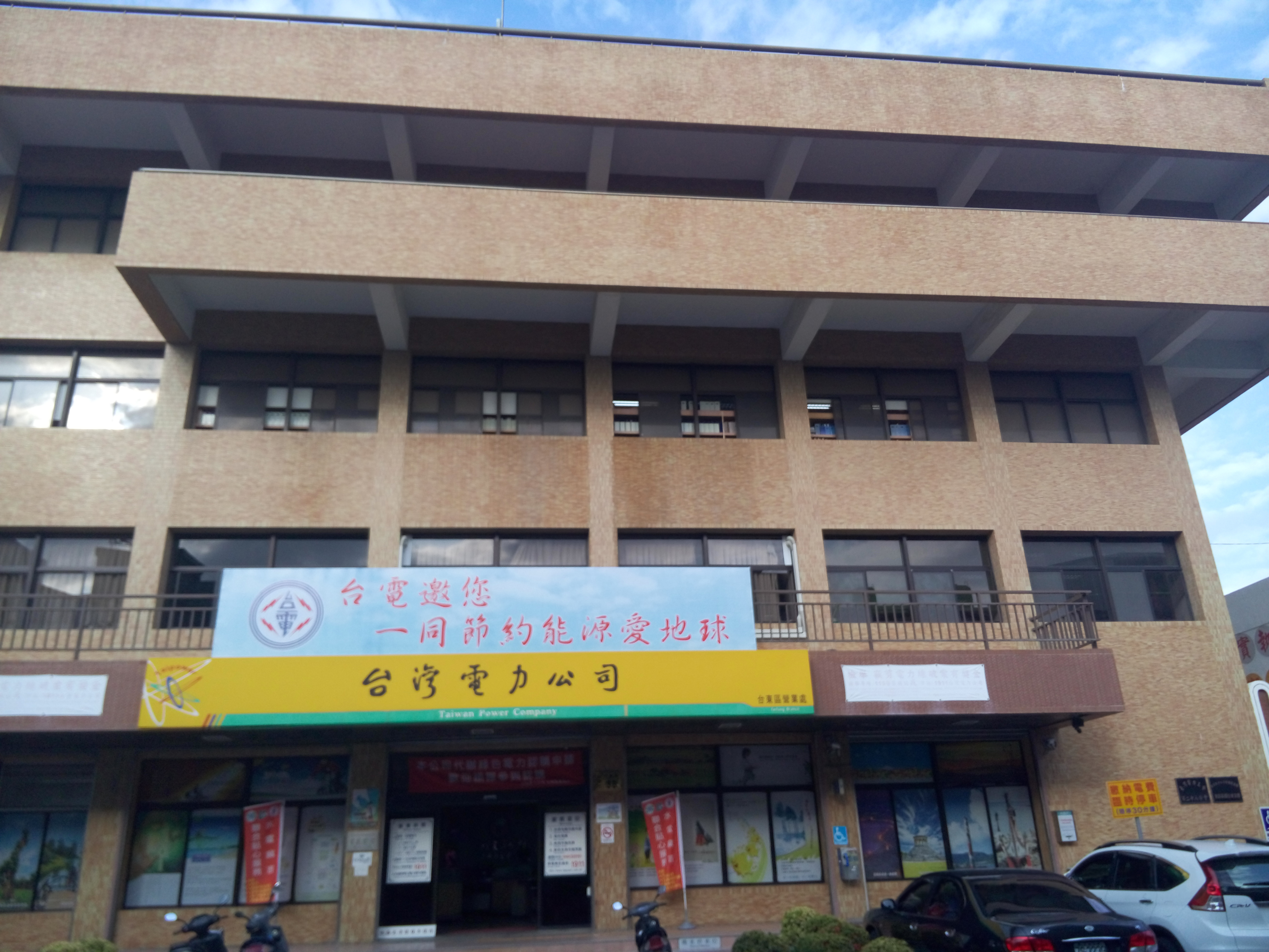 中文（台灣）: 台灣電力公司台東區營業處。